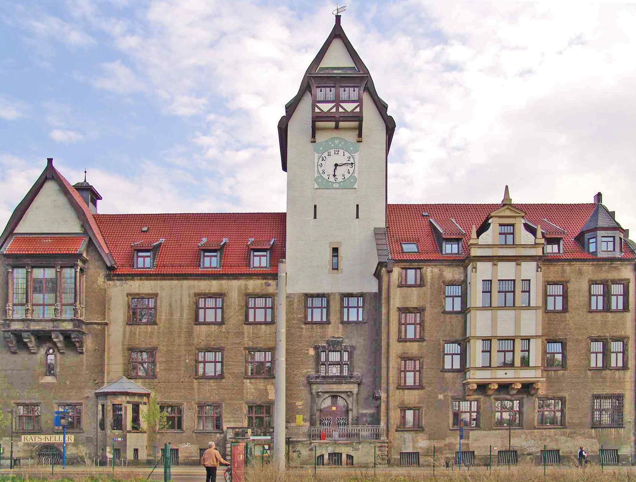 Rathaus von Leipzig-Schönefeld (2005)